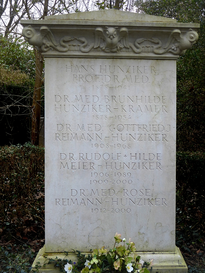 Hans Hunziker-Kramer (1878–1941) Dr.med., Professor, Hochschullehrer für Hygiene und soziale Medizin, Frauenarzt, Familiengrab auf dem Friedhof Hörnli, Riehen, Basel-Stadt